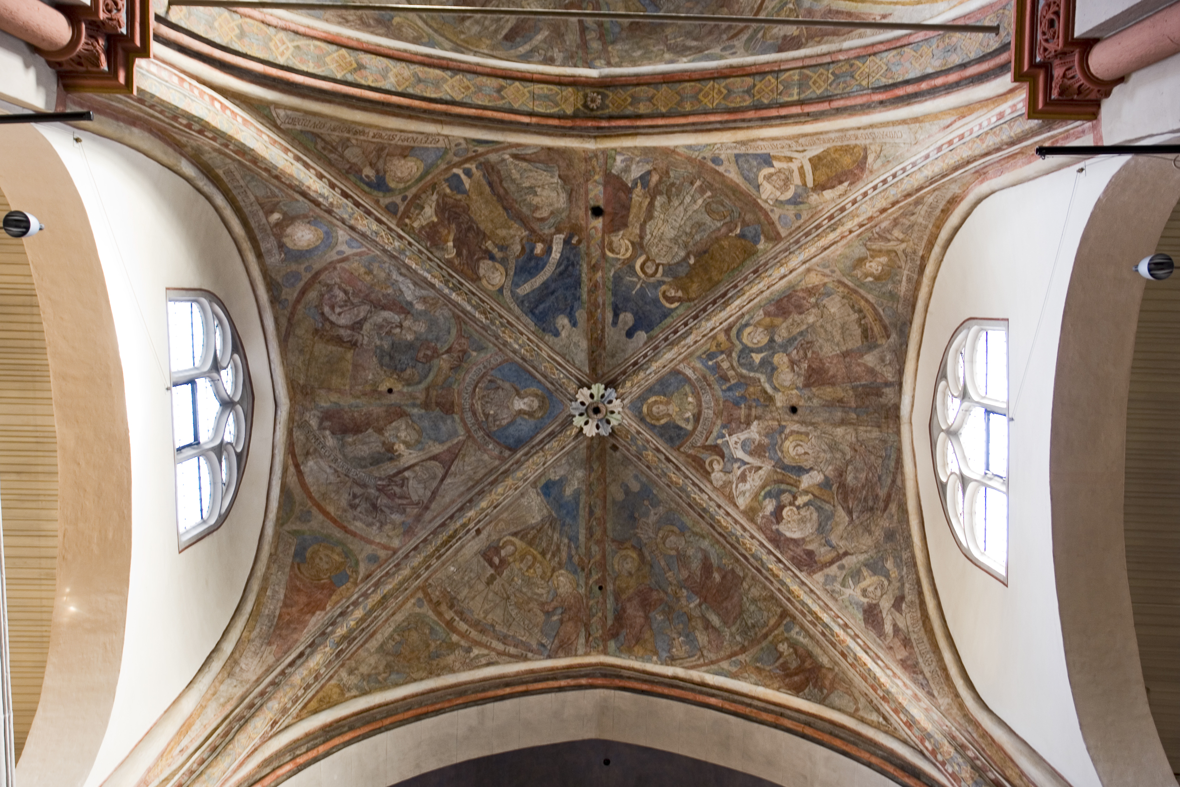 St. Maria in Lyskirchen, Gewölbefresken (vor dem Chor)